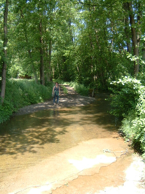 Gaybach, etwa 15km langer Wasserlauf in der Südeifel. Hier der Gaybach bei Obersgegen bei Körperich